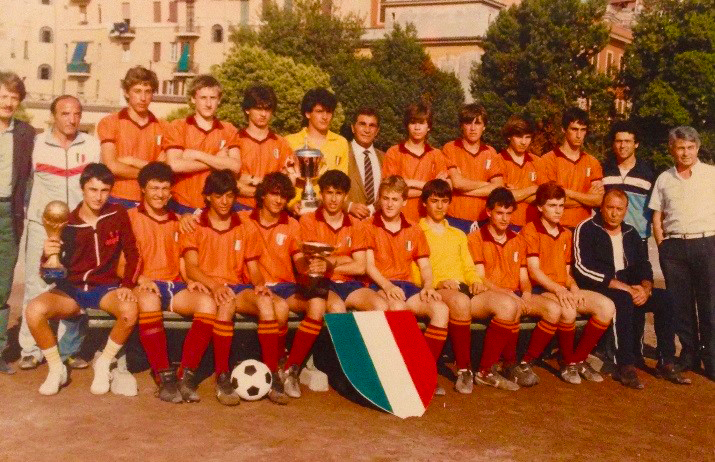 la squadra della Romulea dei giovanissimi campioni d'italia nel 1983